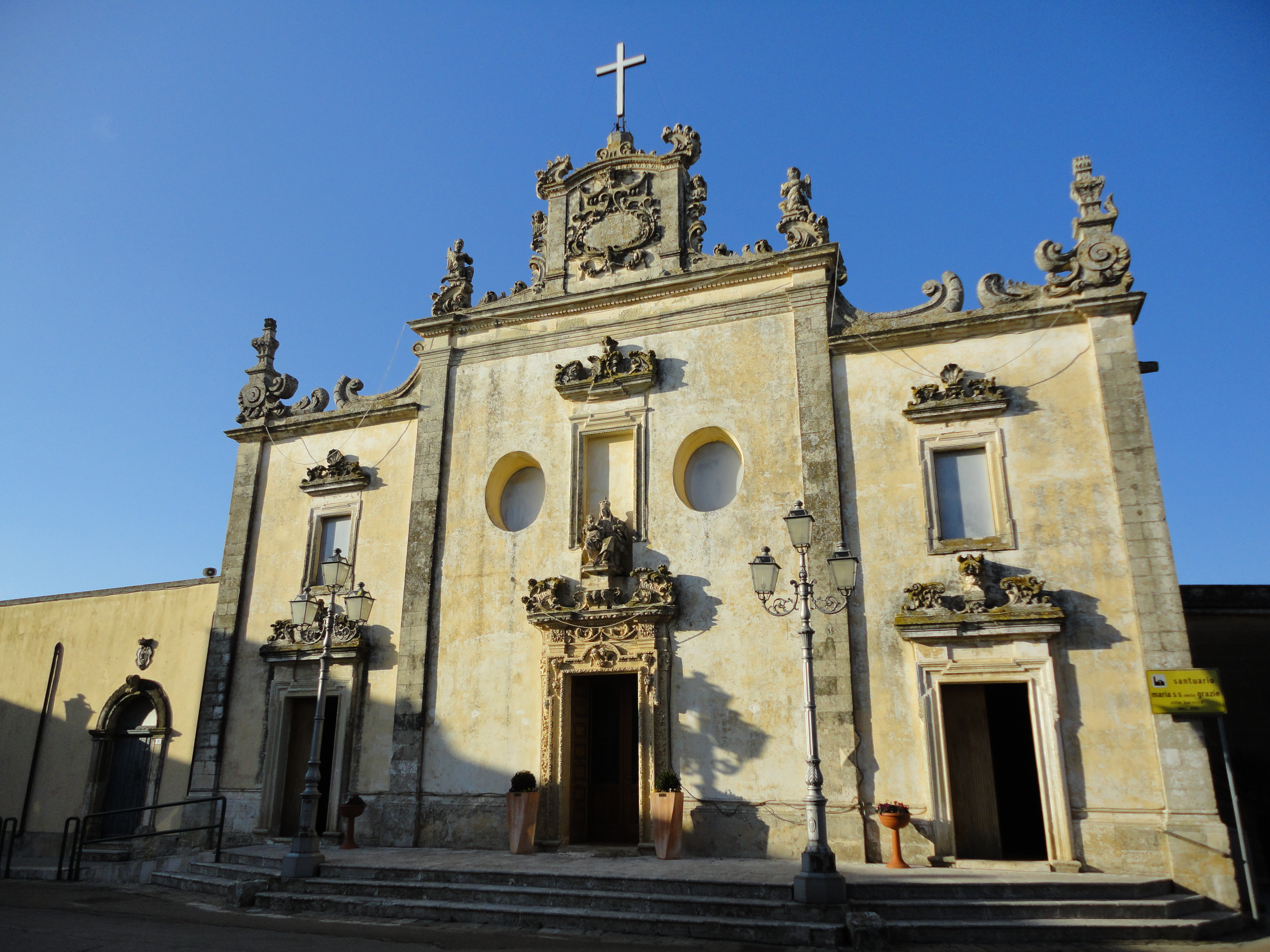 Santuario della Madonna delle Grazie Sanarica, Lecce